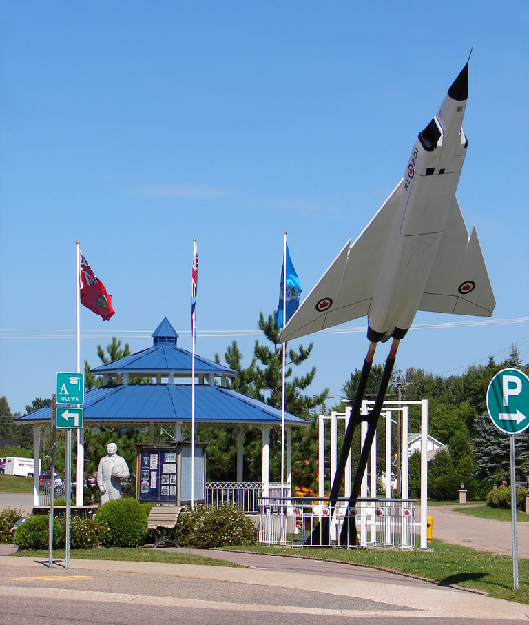 Żurakowski Park in Barry's Bay, Ontario, Canada